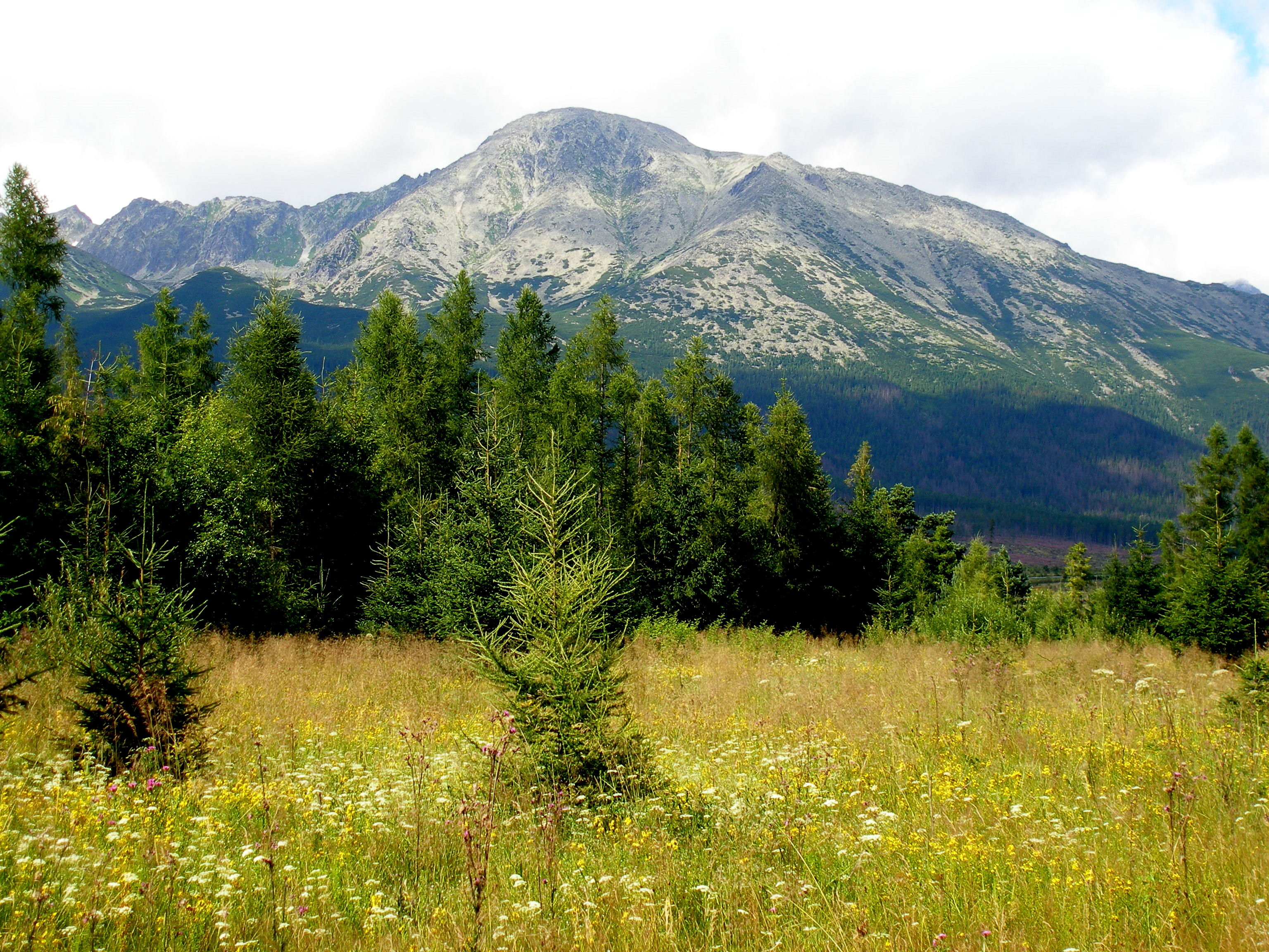 Hotelový komplex Hubert a okolie pri podtatranskej obci Gerlachov.V pozadí Slavkovský štít.